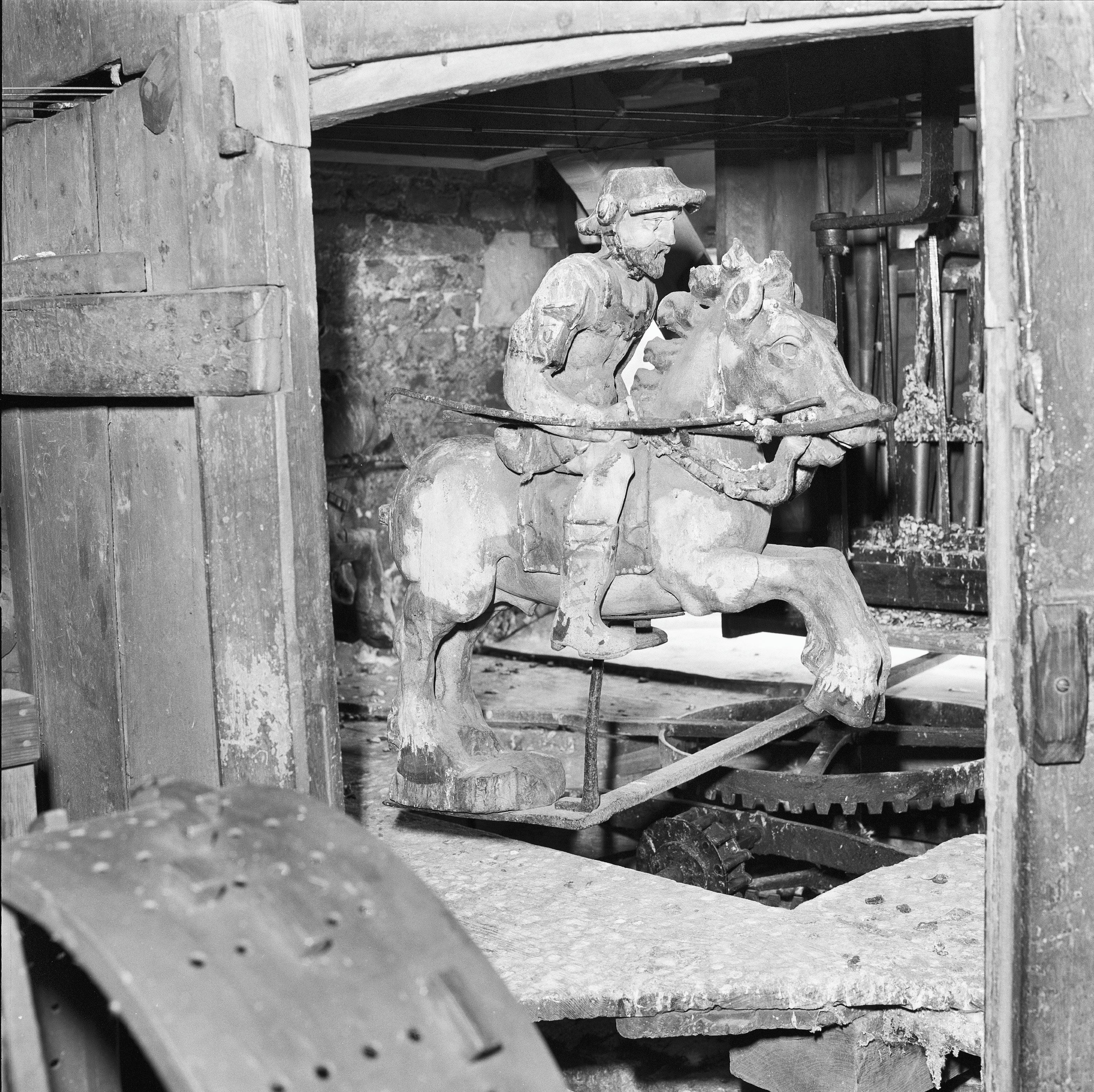 WAAG: INTERIEUR, TOREN, KLOKKENSPEL, RUITERSPEL, DETAIL